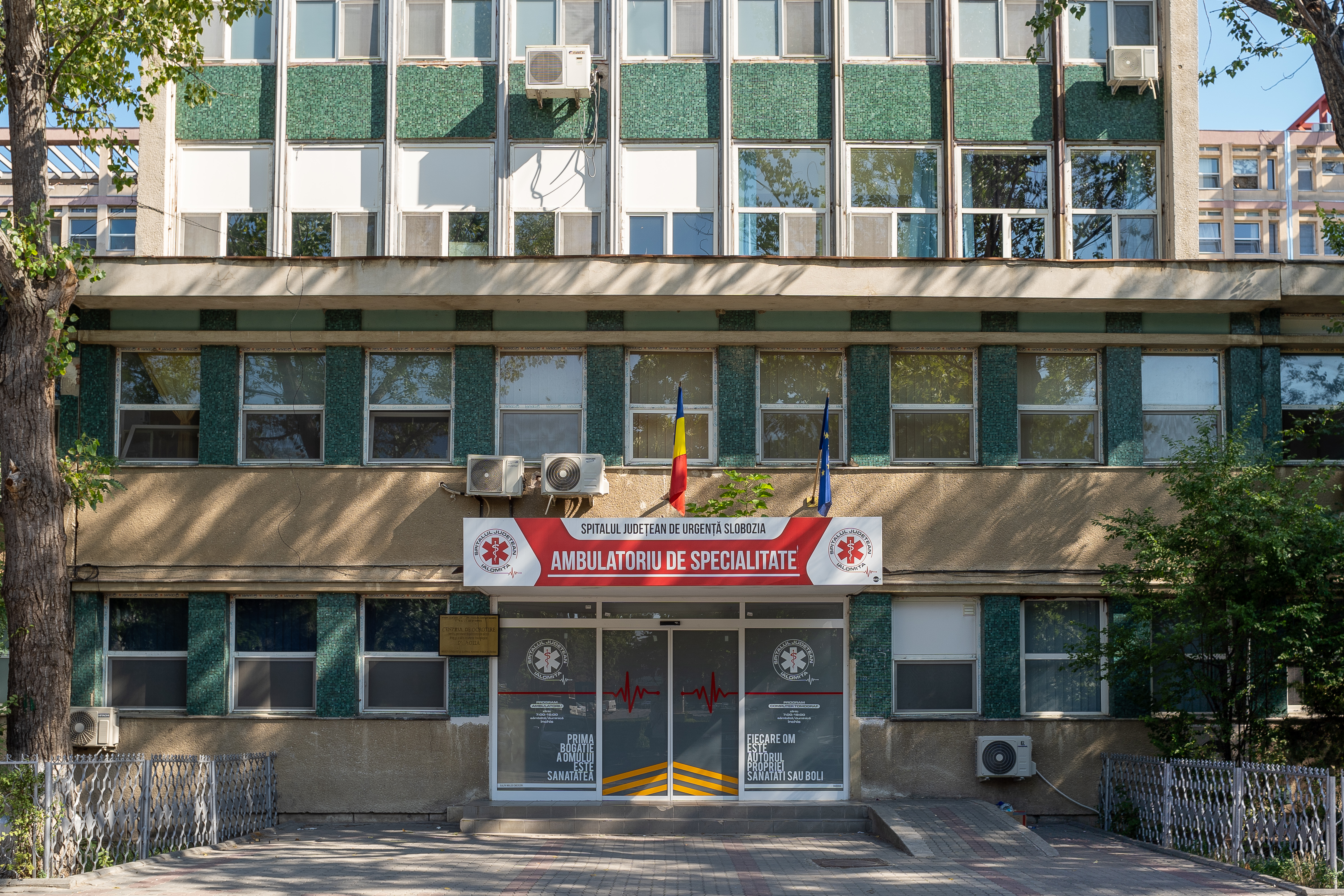 Intrarea pricipală, Ambulatoriu de Specialitate